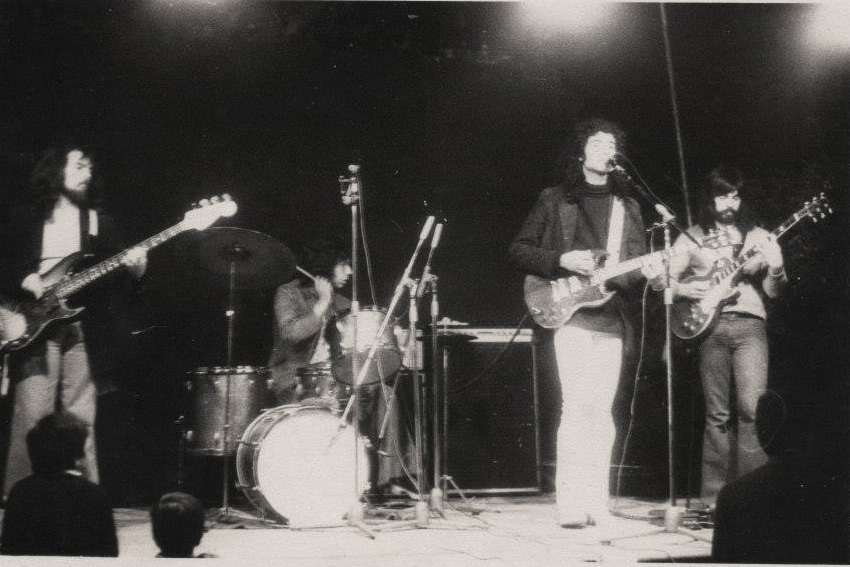 Banda Tiempo de Rock tocando en la Feria del Libro de Montevideo en 1974